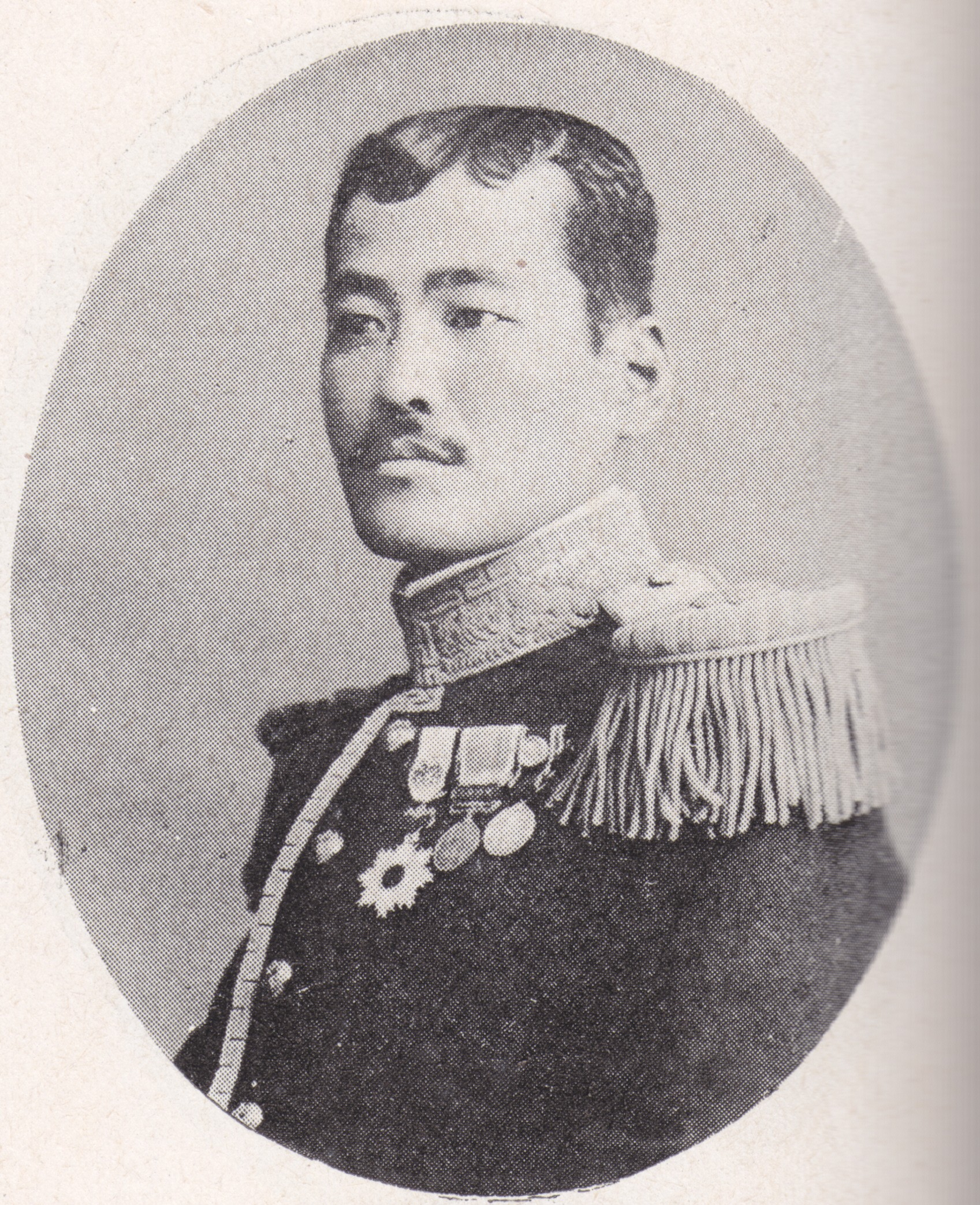 子爵倉橋泰昌